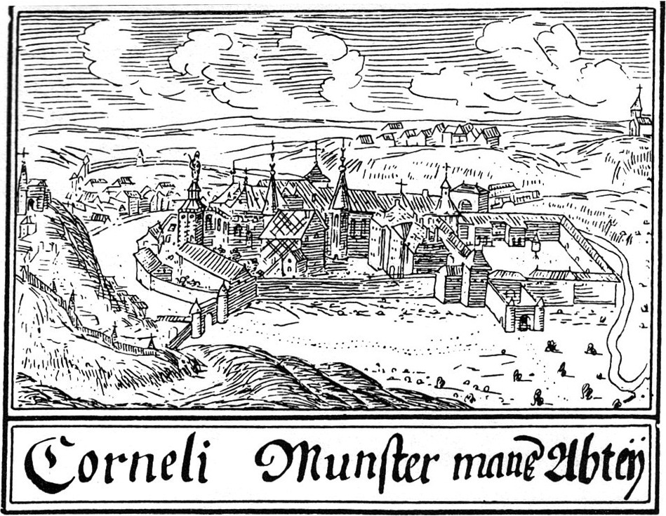 Abbildung der Reichsabtei Kornelimünster und der Klosterkirche im Codex Welser